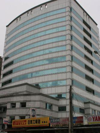 Bân-lâm-gú: Tiong-kok Kok-bîn-tóng tsāi Tâi-pak--ê tsóng-pōo. A-jîn(seasurfer) hip--ê.